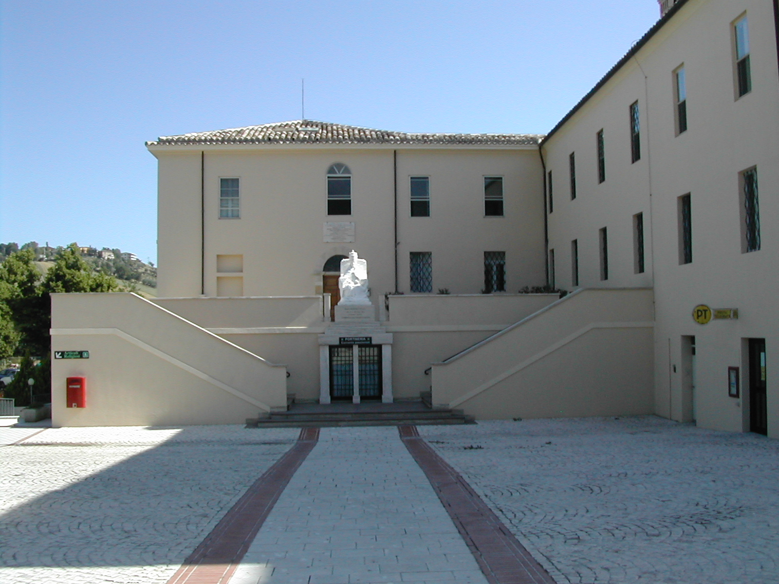 Santuario di San Gabriele dell'Addolorata ad Isola del Gran Sasso d'Italia, in Italia